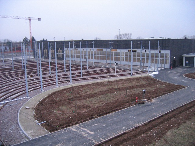 Deposito TEB